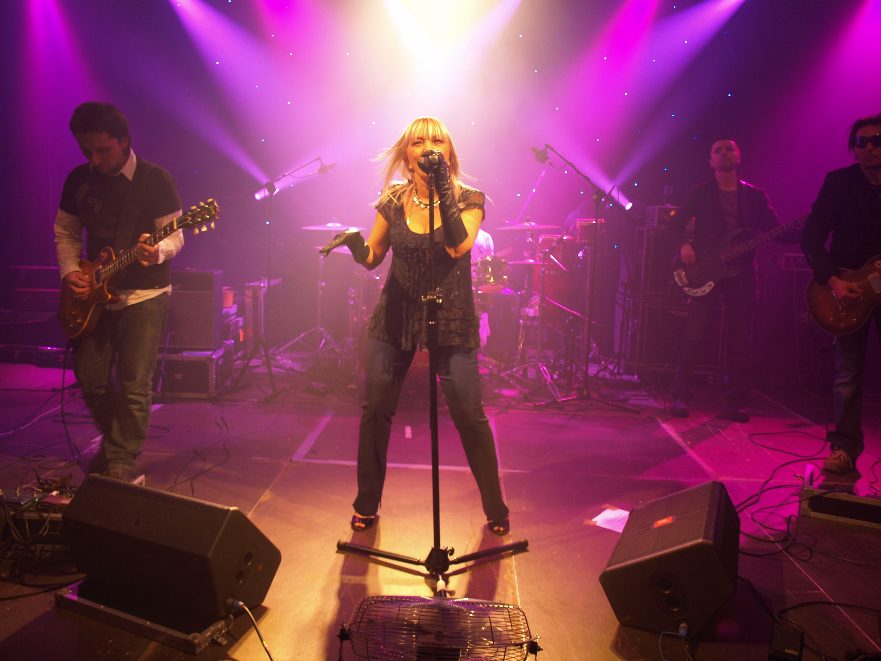 Malgorzata Ostrowska Team